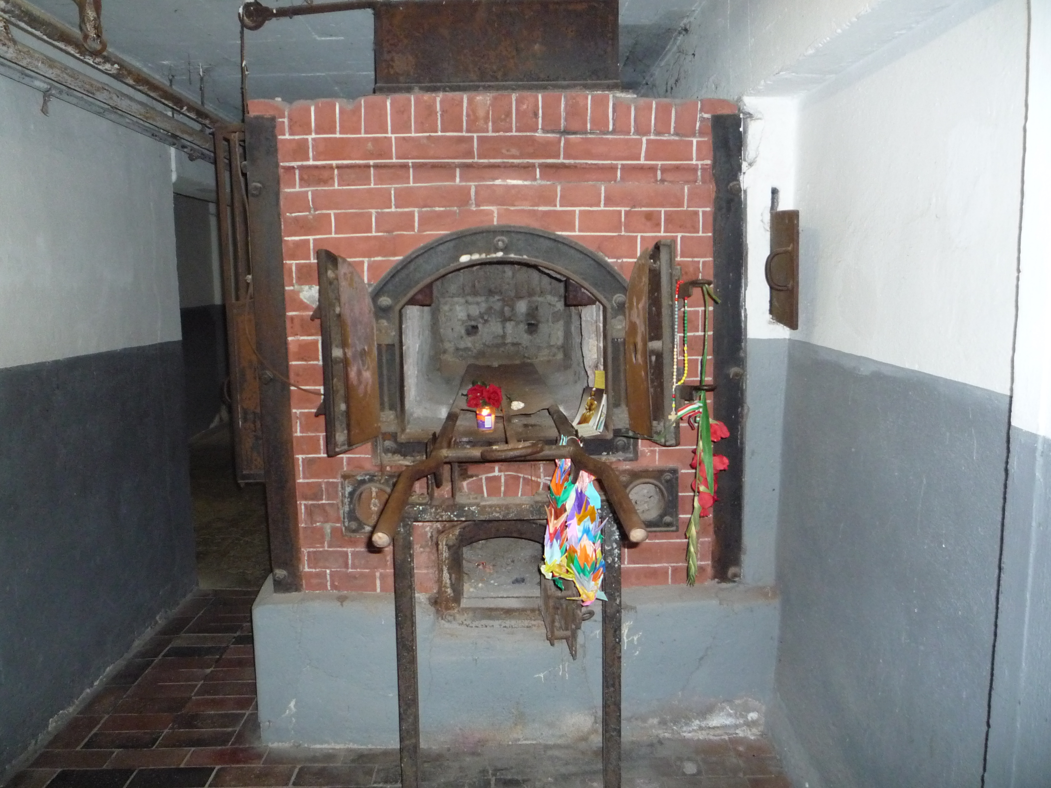 Ceci est le premier four crématoire installé dans le camp. Il se trouvait sous la prison.